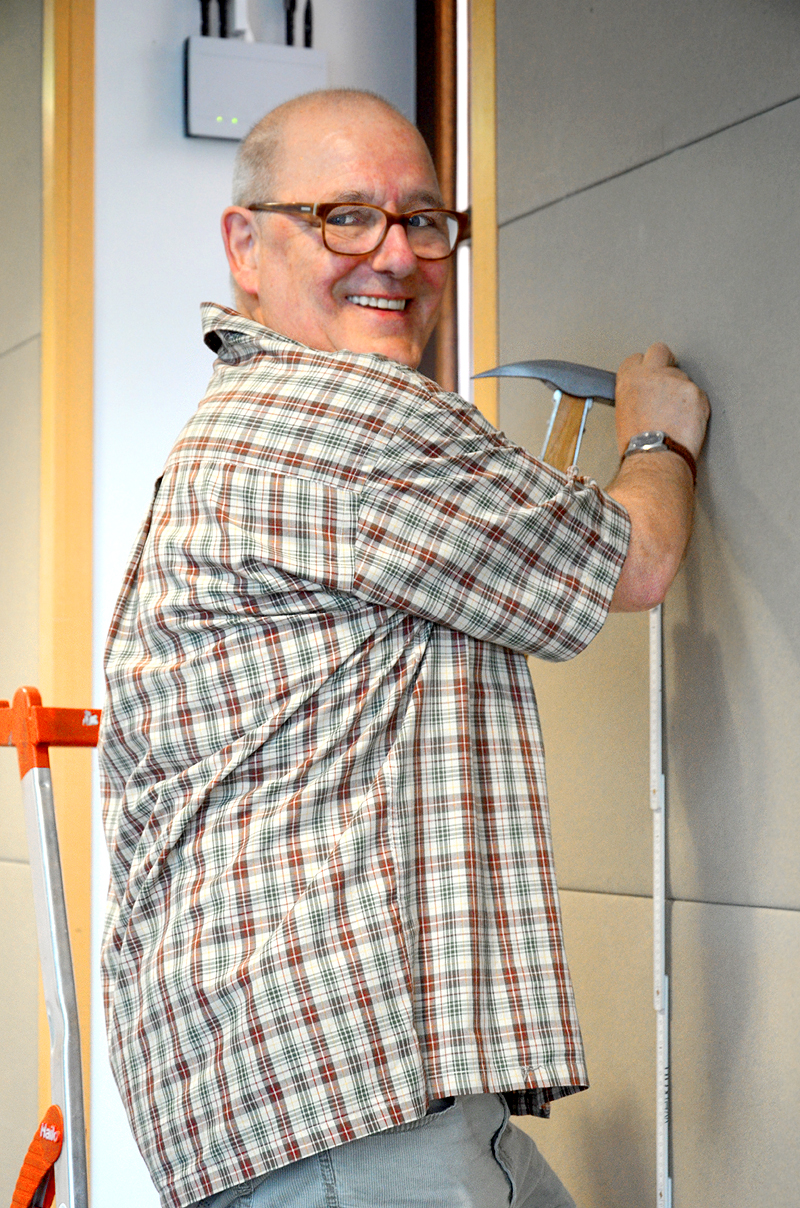 „Eigentlich bin ich Maler und Grafiker ...“ erklärte der Künstler Hans-Ruprecht Leiß einmal in einem Fernseh-Interview für den NDR. Auf diesem Foto sehen wir ihn am Vormittag des 23. Mai 2017 mit Zollstock, Hammer und Nagel auf einer Leiter im Hauptgebäude der Deutschen Bank in Hannover am Georgsplatz, wo am Abend des selben Tages die Vernissage seiner Ausstellung „Hans-Ruprecht Leiß - Gezeichnete Welten“ veranstaltet wurde, während der die Schauspielerin, Regisseurin und Moderatorin Vroni Kiefer aus dem Buch Blumen fallen von den Dächern von Heli Ihlefeld las. Die von Karsten Grimpe organisierte Ausstellung war zugleich die 7. in der Reihe LichtBlick der Initiative KunstLichtBlick ...